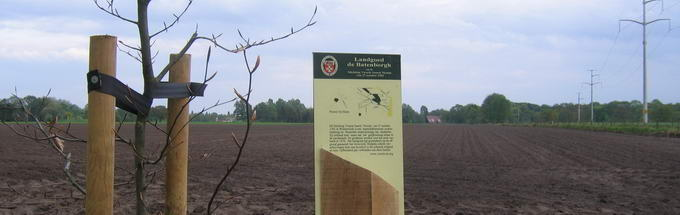 Foto van lustrumboom uit 2001, geplant ter gelegenheid van het 500-jarig bestaan en een landgoedbord aan de rand van Landgoed de Batenborgh bij WInterswijk. Foto is genomen in 2009.